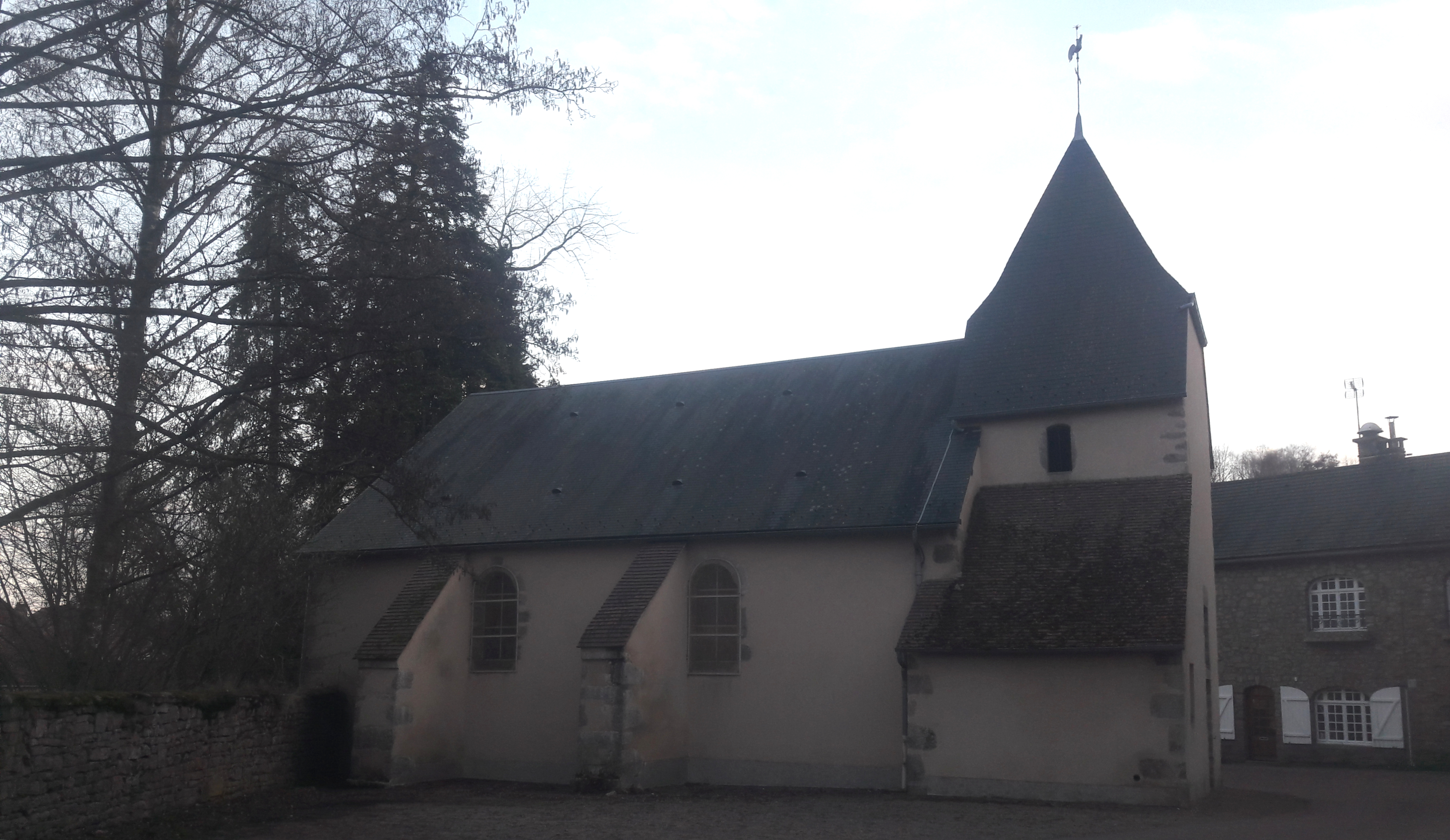 Eglise de Saint-Agnan